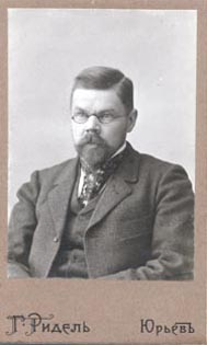 Hermann Adolphi